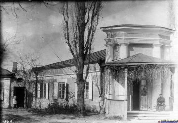 Будинок Мазепи, фото з фондів Державного архіву Житомирської області.